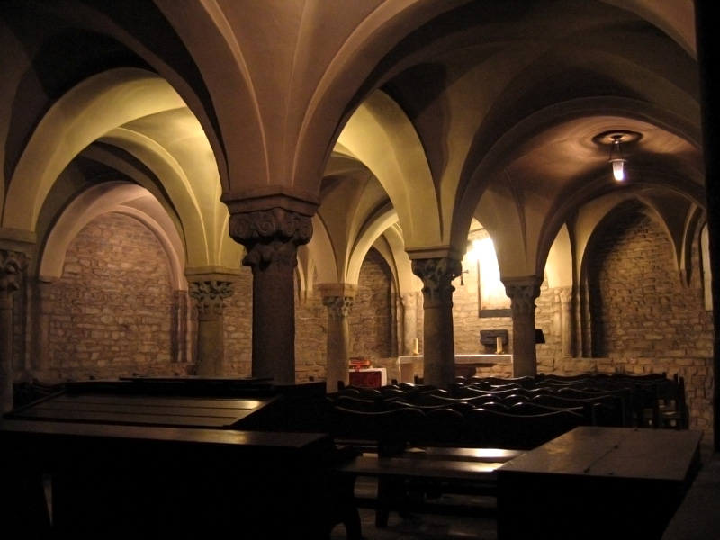 Cripta de la Catedral de Vic, construïda al segle XI, oblidada al segle XV i redescoberta al 1940